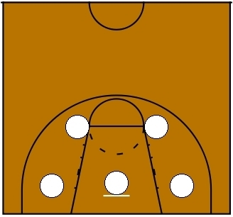 Basketball Zone Defense